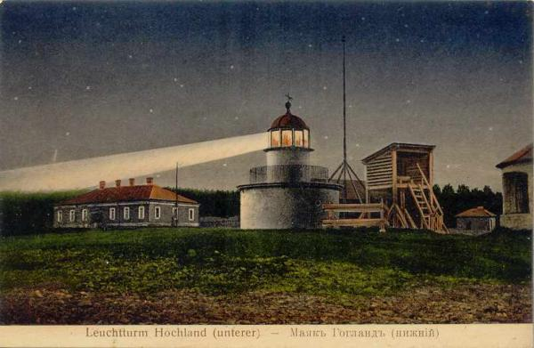 Маяк Гогланд (нижний). Открытка Российской империи.